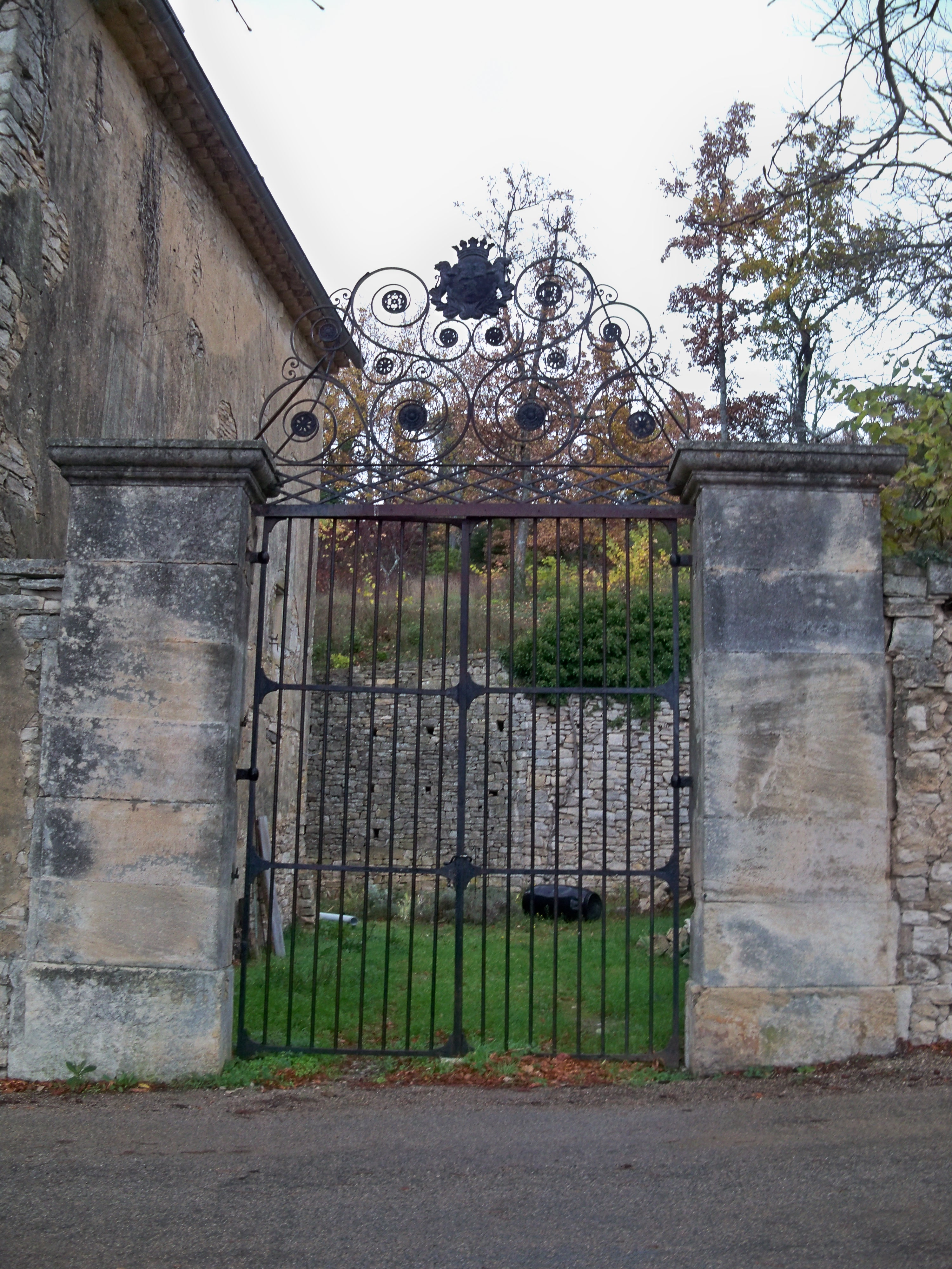 Portail du Chateau de Sainte-Croix-à-Lauze (04)